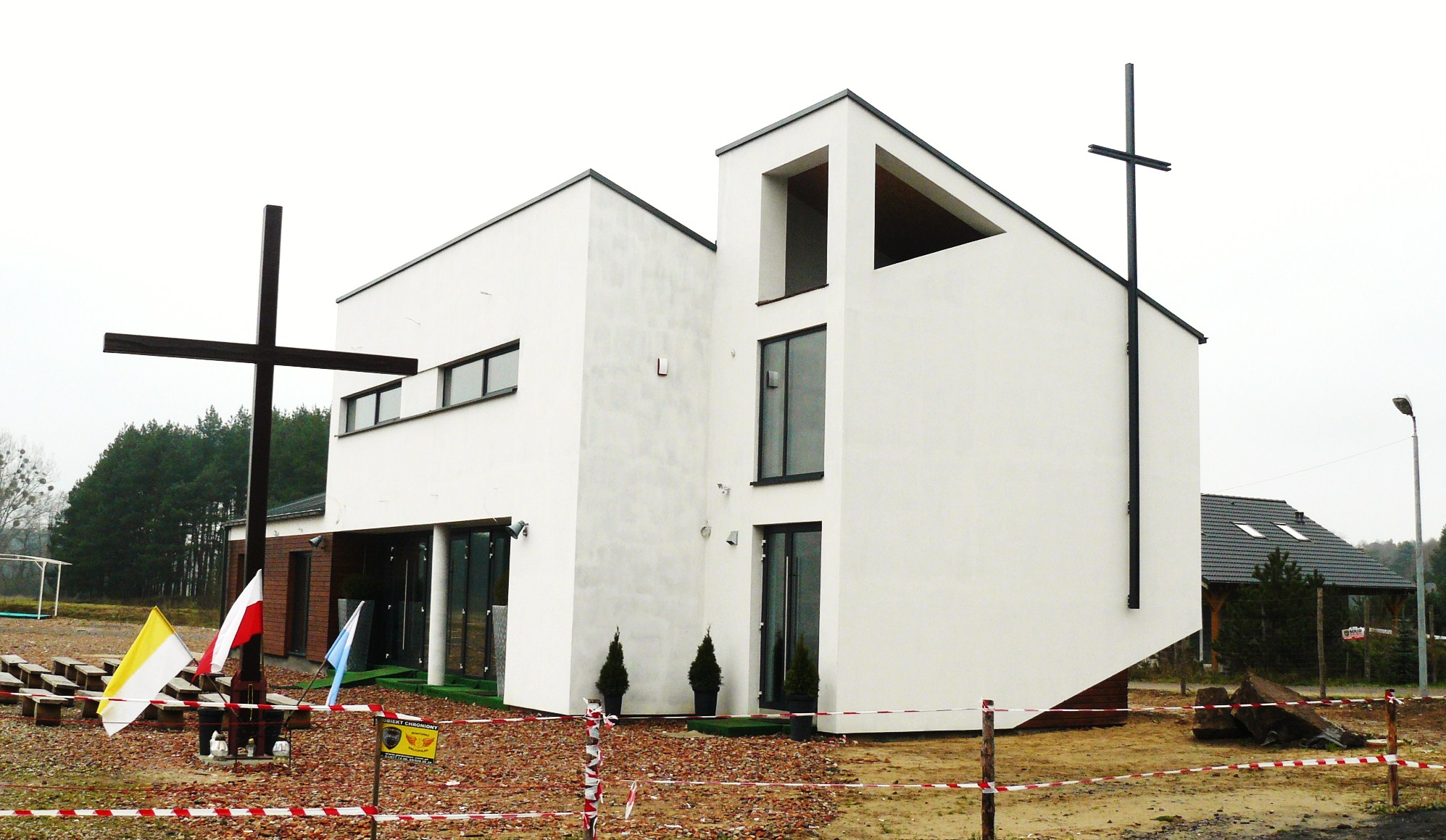 Kościół bł. Matki Teresy z Kalkuty w Kamionkach.